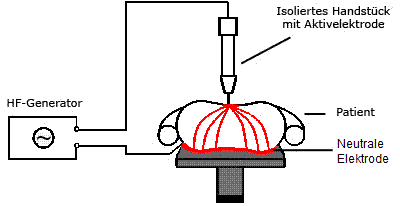 HF-Chirurgie_monopolar